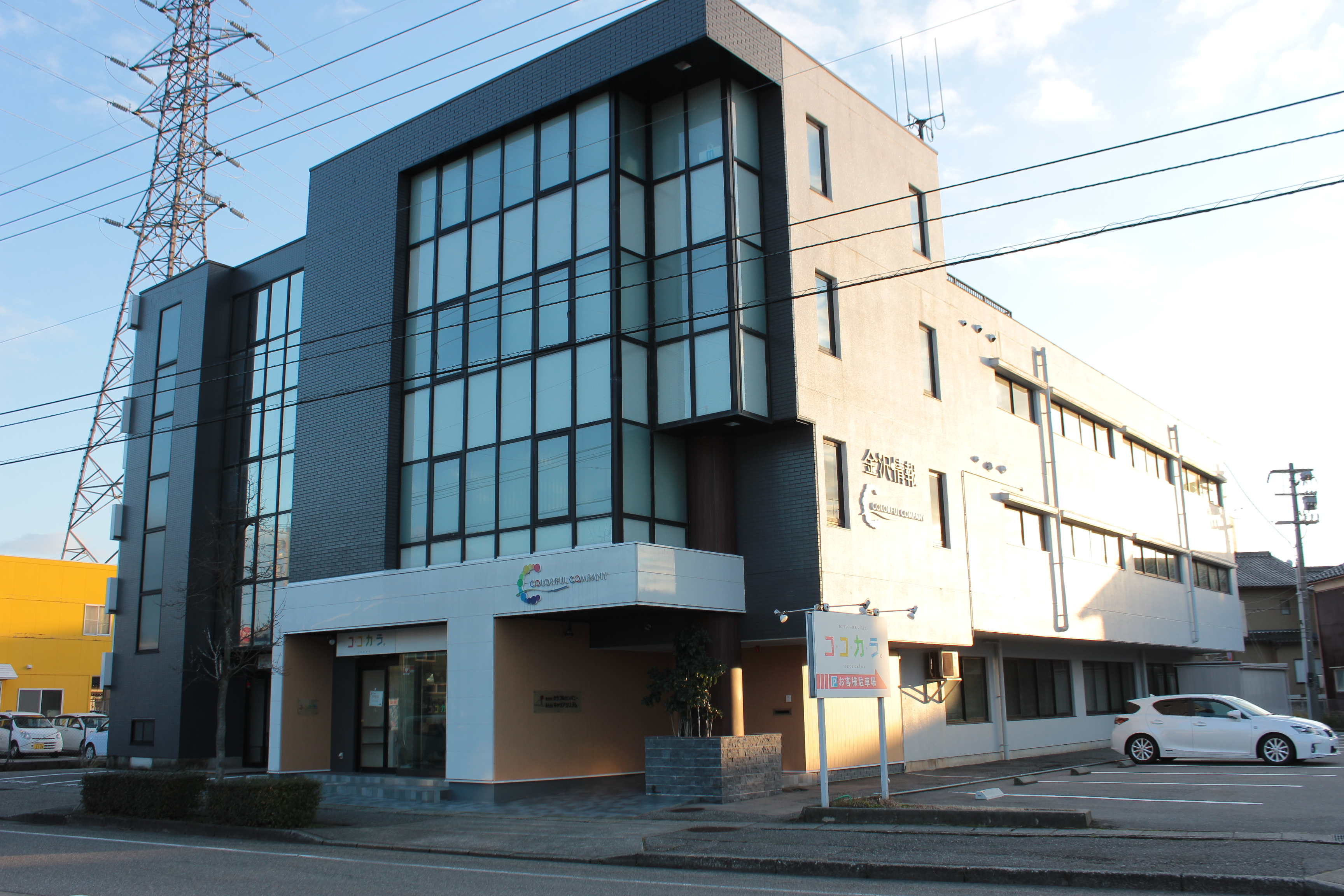 カラフルカンパニー本社（石川県金沢市） Canon EOS Kiss X5